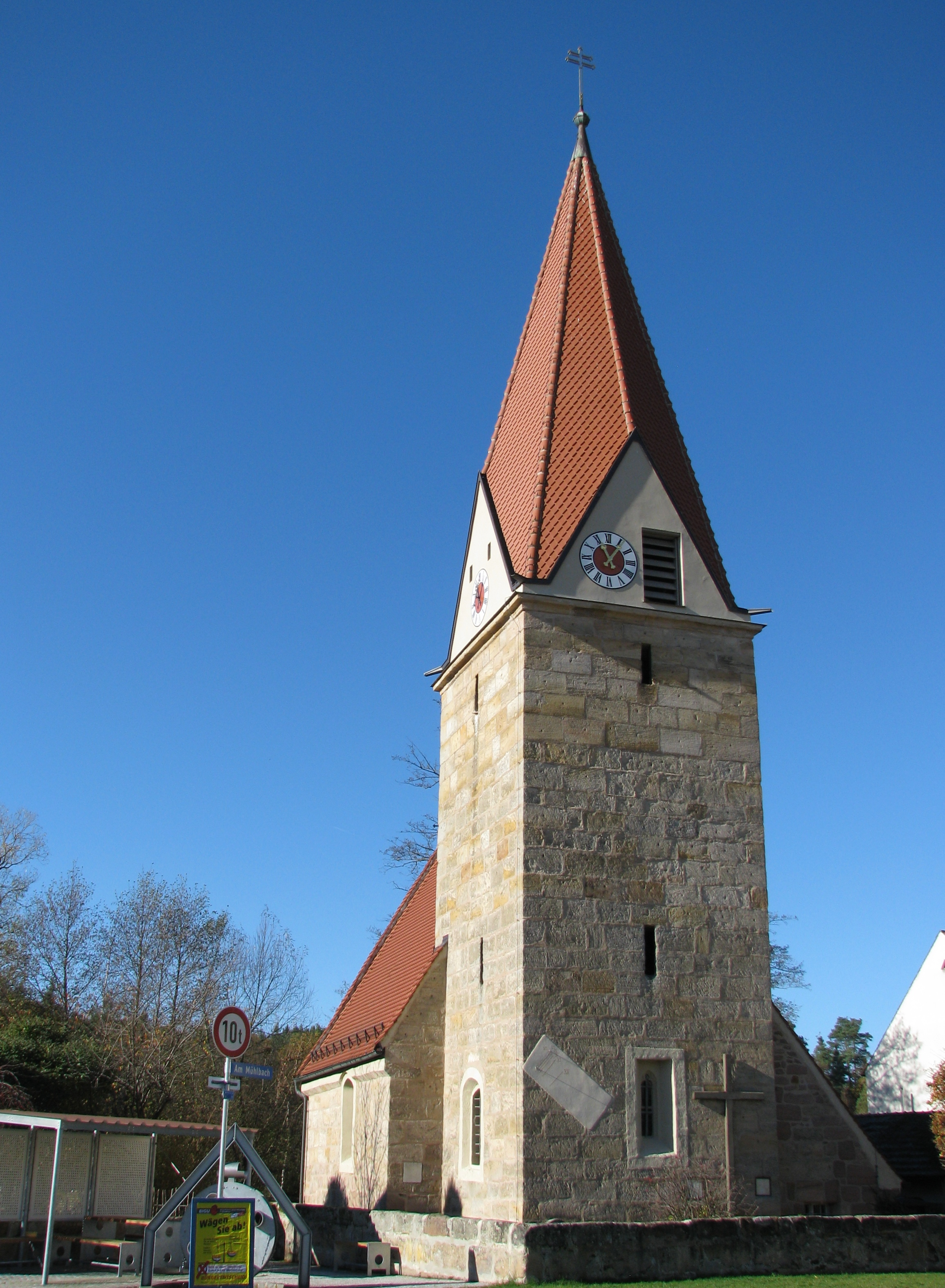 Hofstetten, Ortsteil von Hilpoltstein im mittelfränkischen Landkreis Roth, Katholische Filialkirche Mariä Verkündigung